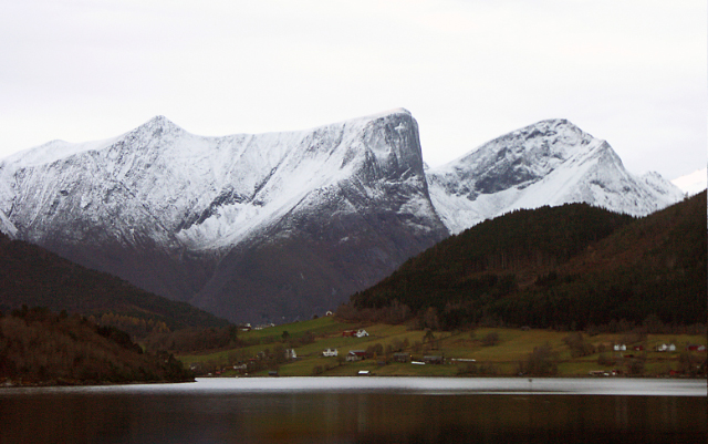 Rauma i Norge